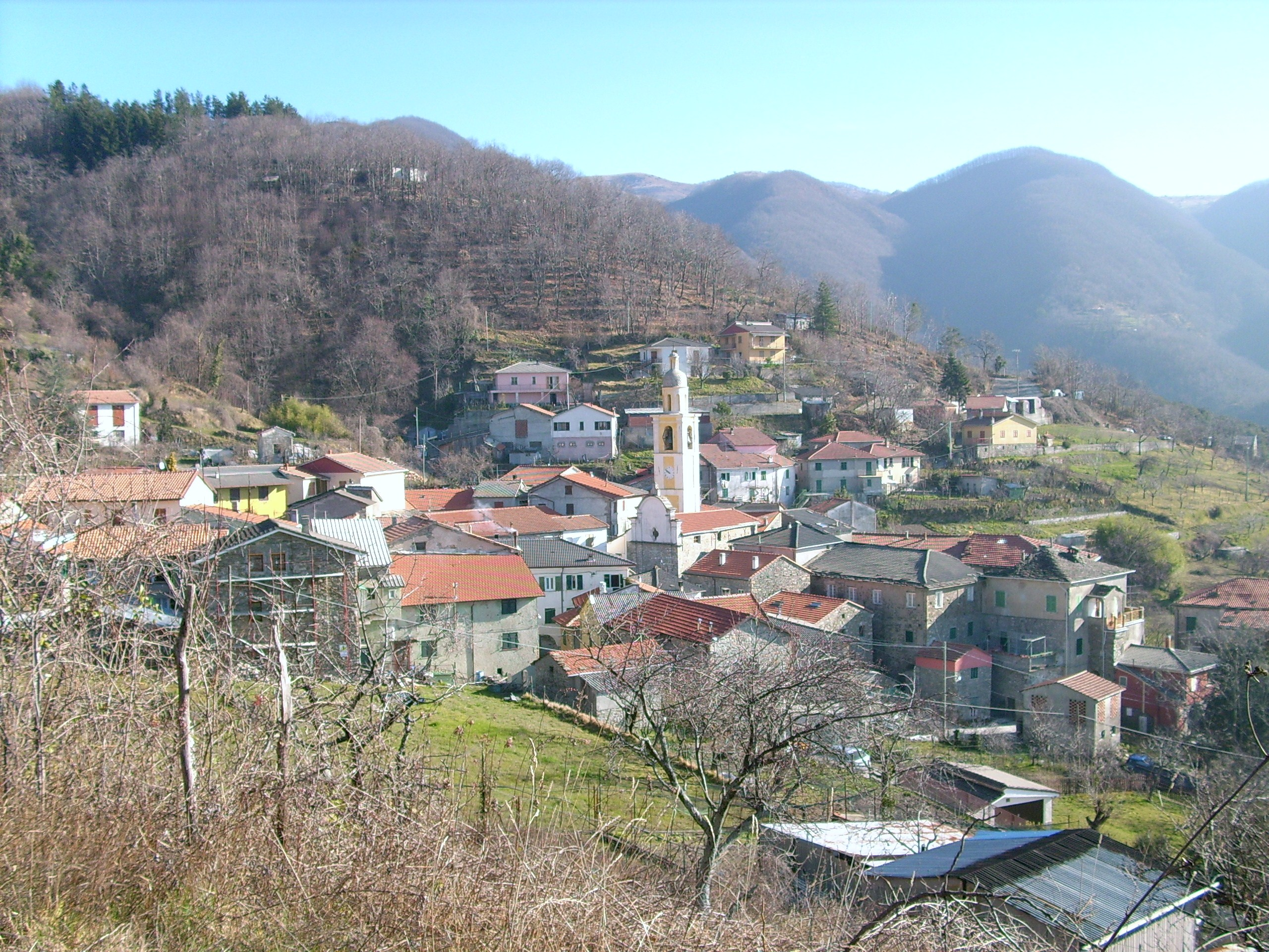 Torpiana, Zignago, Liguria, Italy